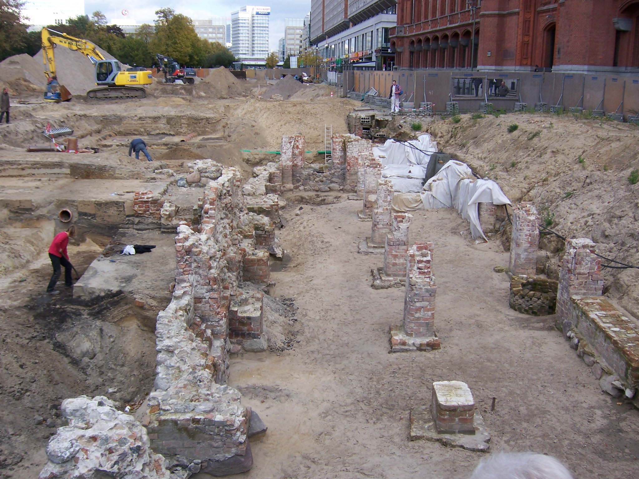 Berlin, Altes Rathaus, archäologische Grabungen in Vorbereitung des Baus des U-Bahnhofs Berliner Rathaus